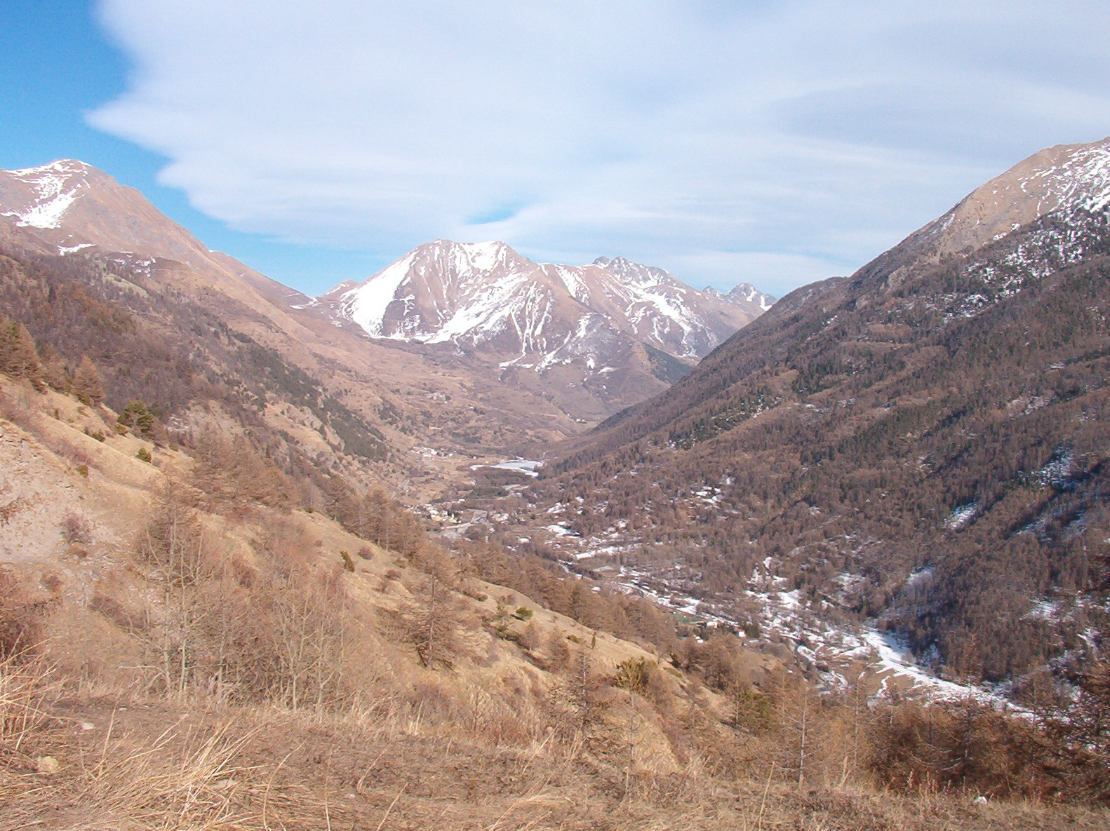 Val Chisone vista dal Gran Puy, frazione di Pragelato - Val Chisone - Provincia di Torino - Italy